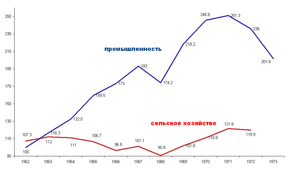 Показатели развития промышленности и сельского хозяйства Южного Вьетнама с 1961 по 1973 год.